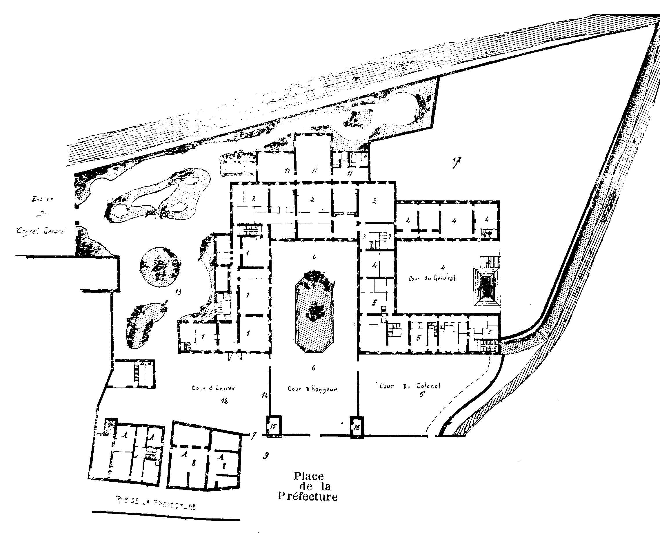 Charleville-Mézières, la préfecture.